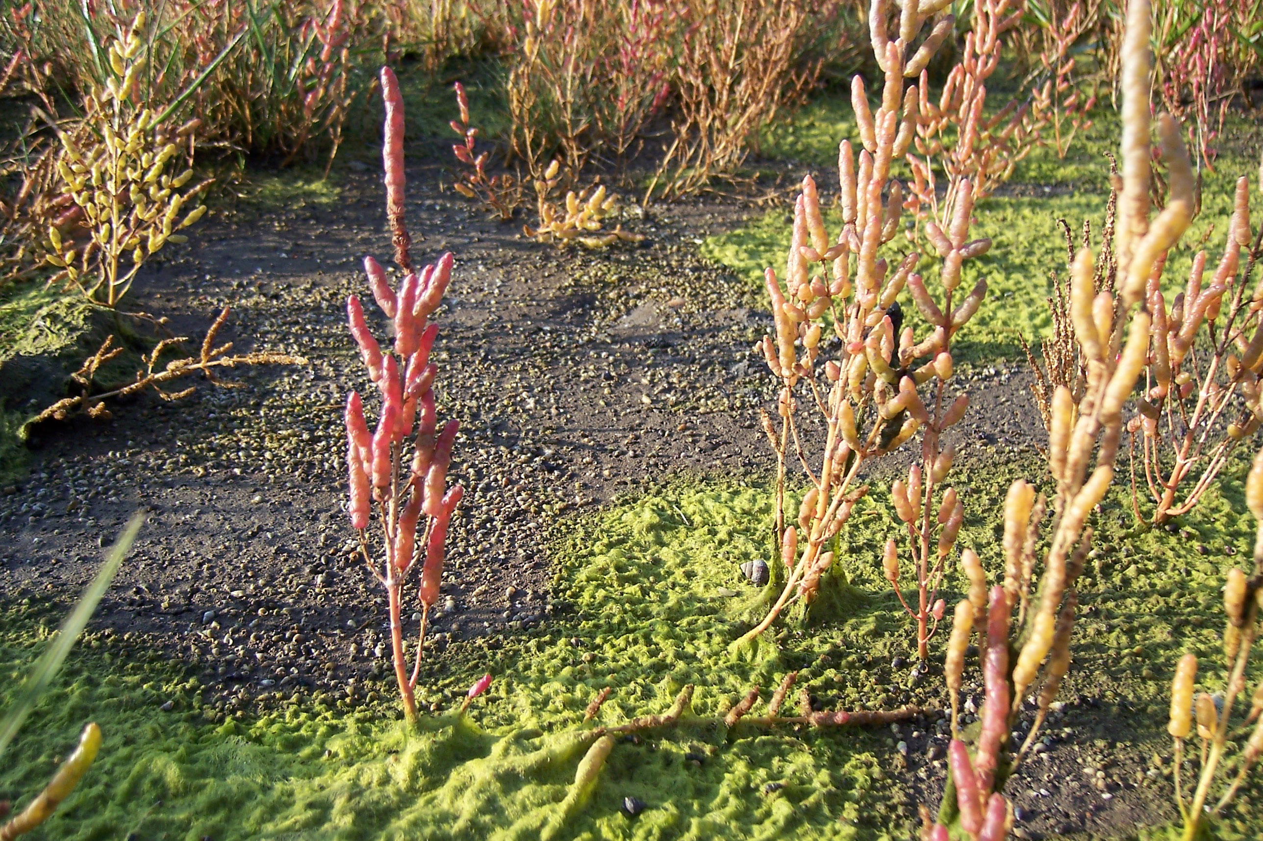 Nordseeinsel Spiekeroog: Queller (Salicornia europaea)